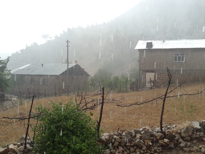 ulupınarda yağmur yağarken